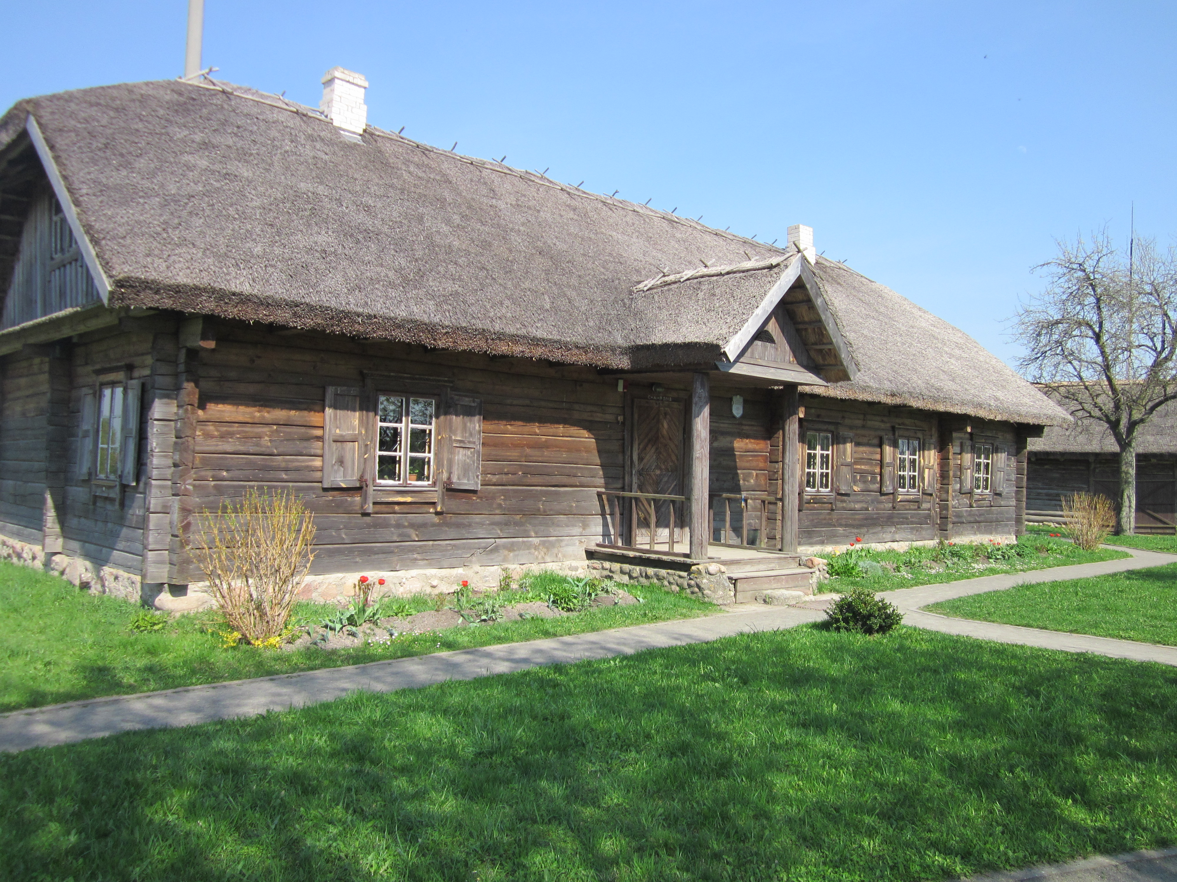 Беларуская (тарашкевіца): Сядзіба-мэмарыял А. Міцкевіча. хутар Завосьсе This is a photo of Belarusian heritage monument. Reference number: 113Г000056 ( WLM)